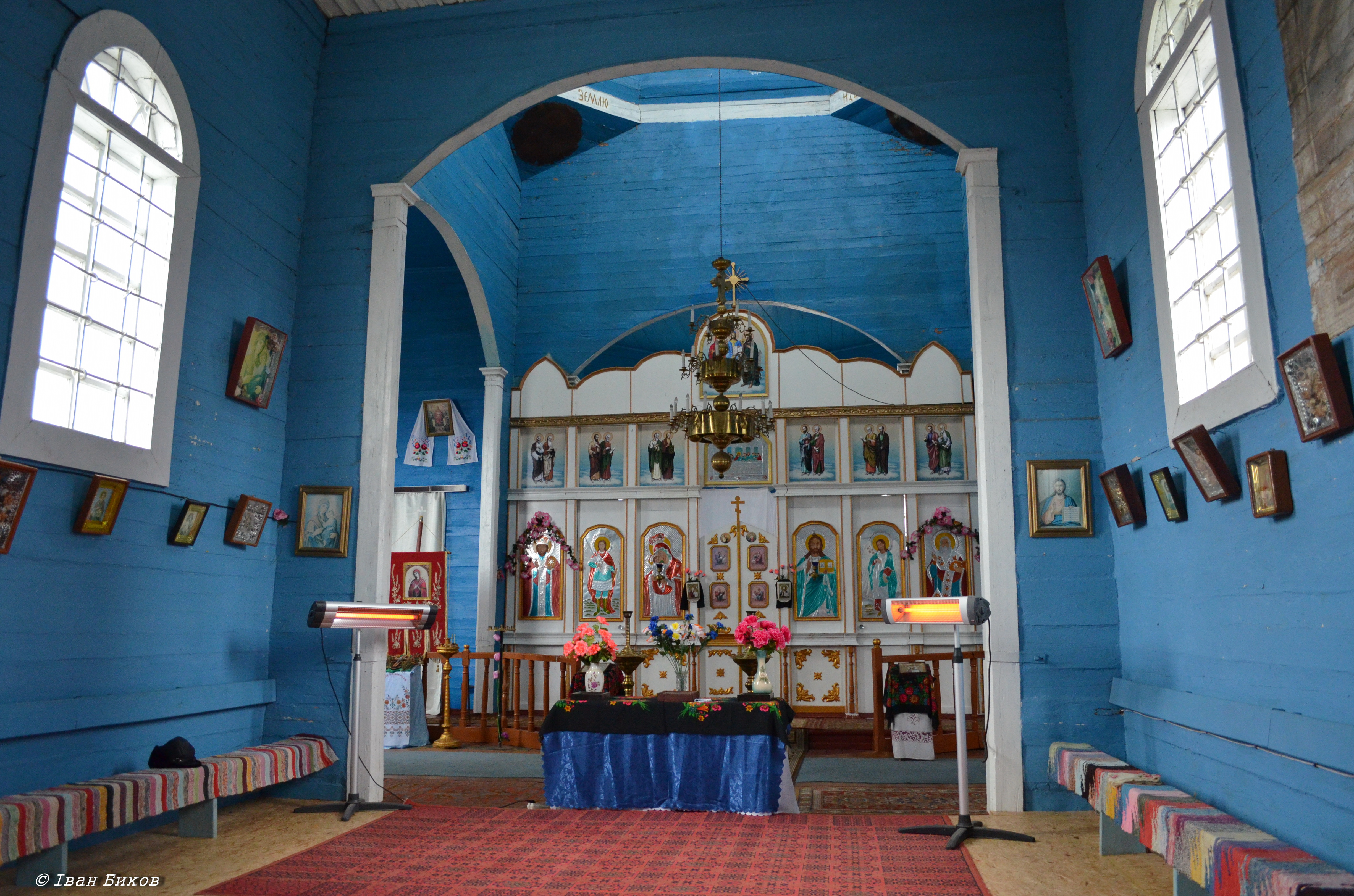 Півні. Церква Івана Златоуста. 1868 р. Класицизм в дереві